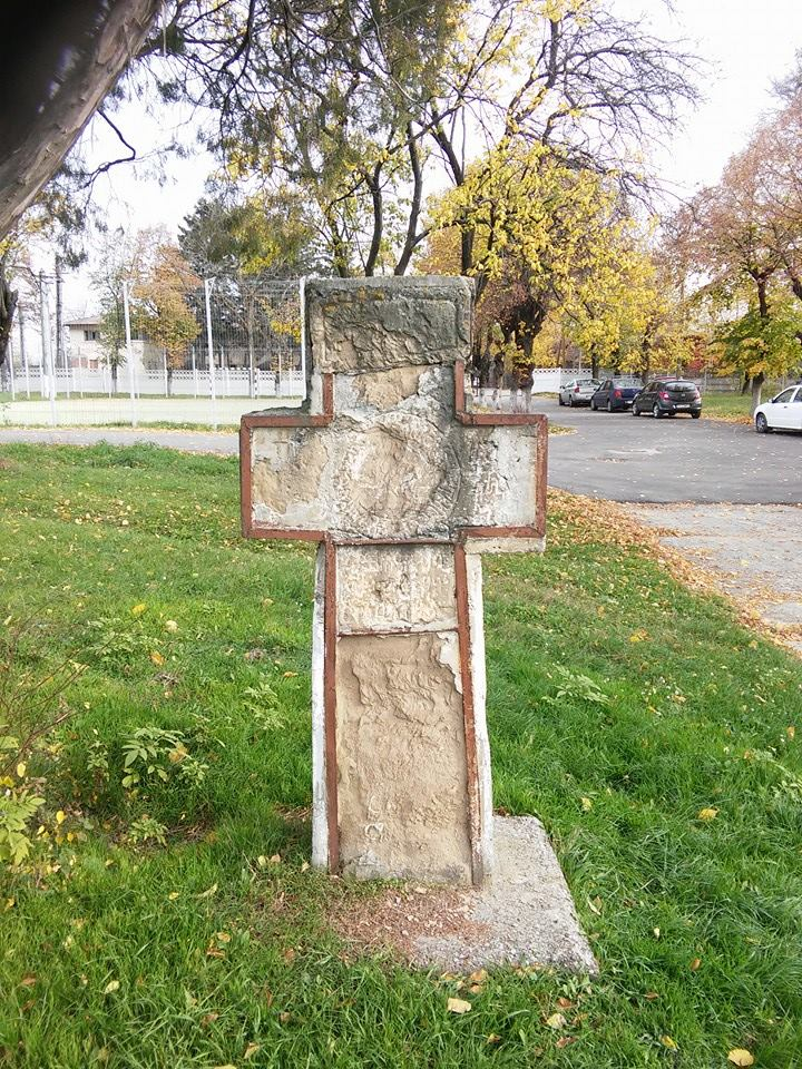 Cruce de pomenire, din piatră